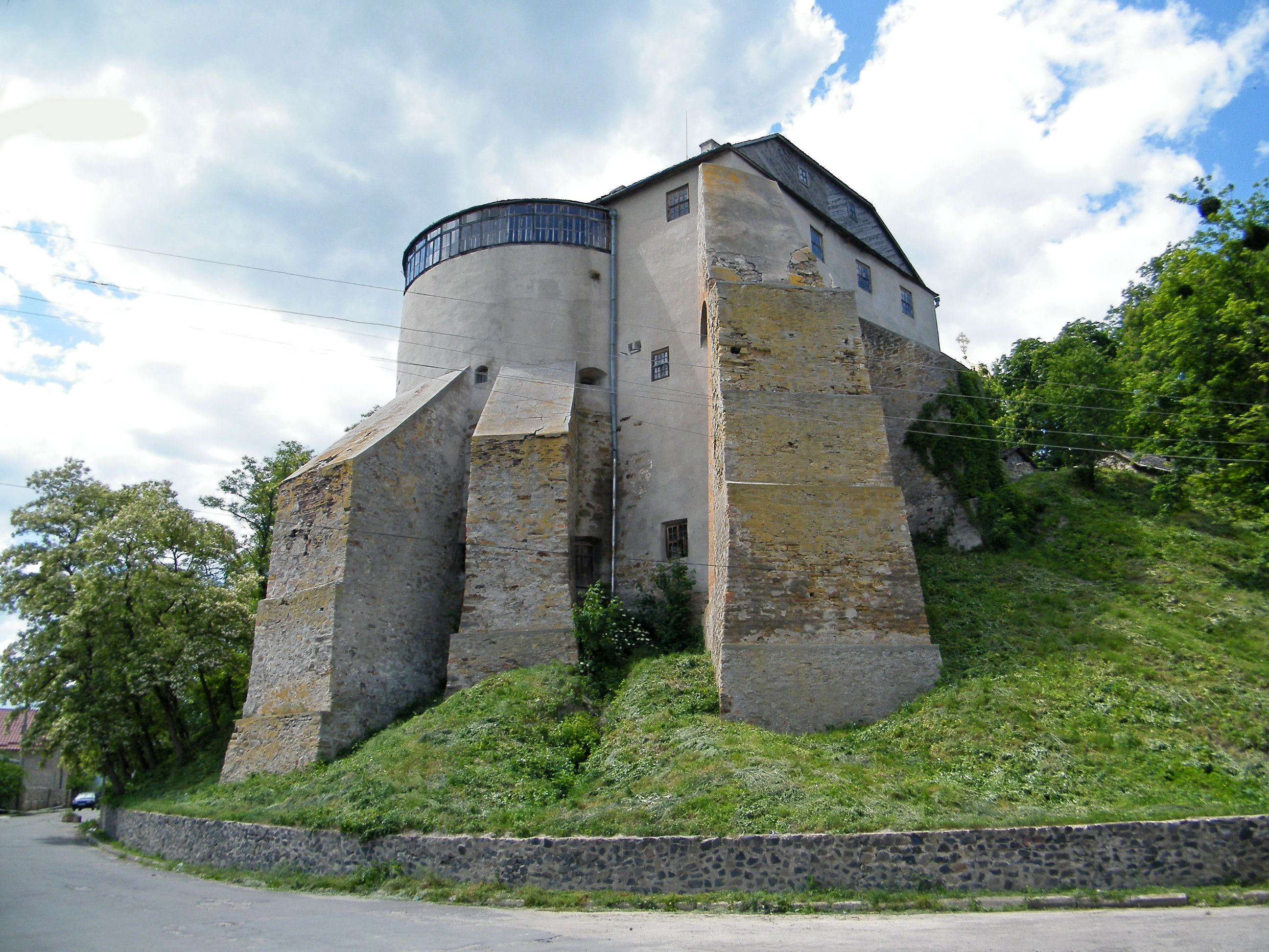 Сторожевая башня